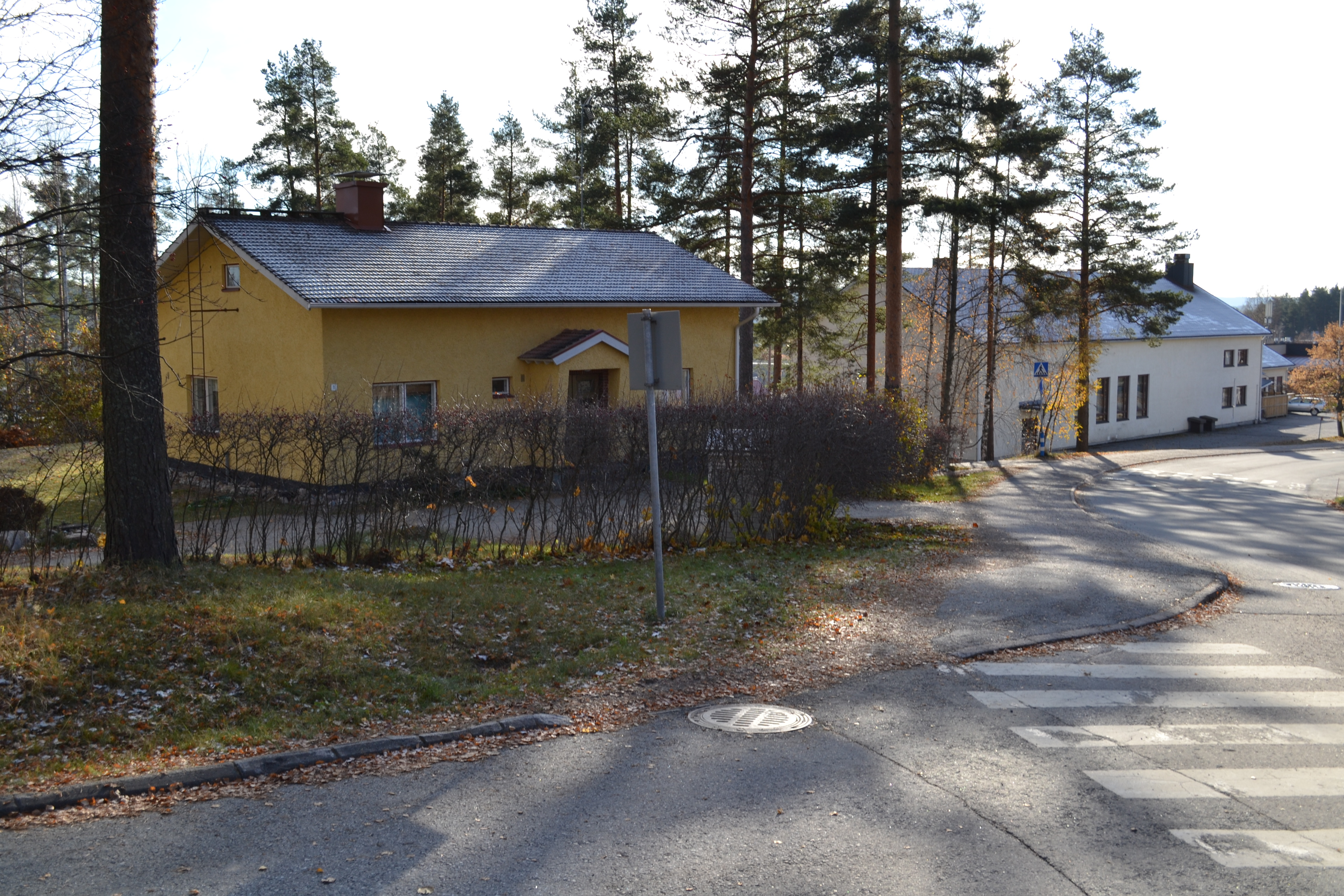 Taloja Savonmäessä, Jyväskylässä